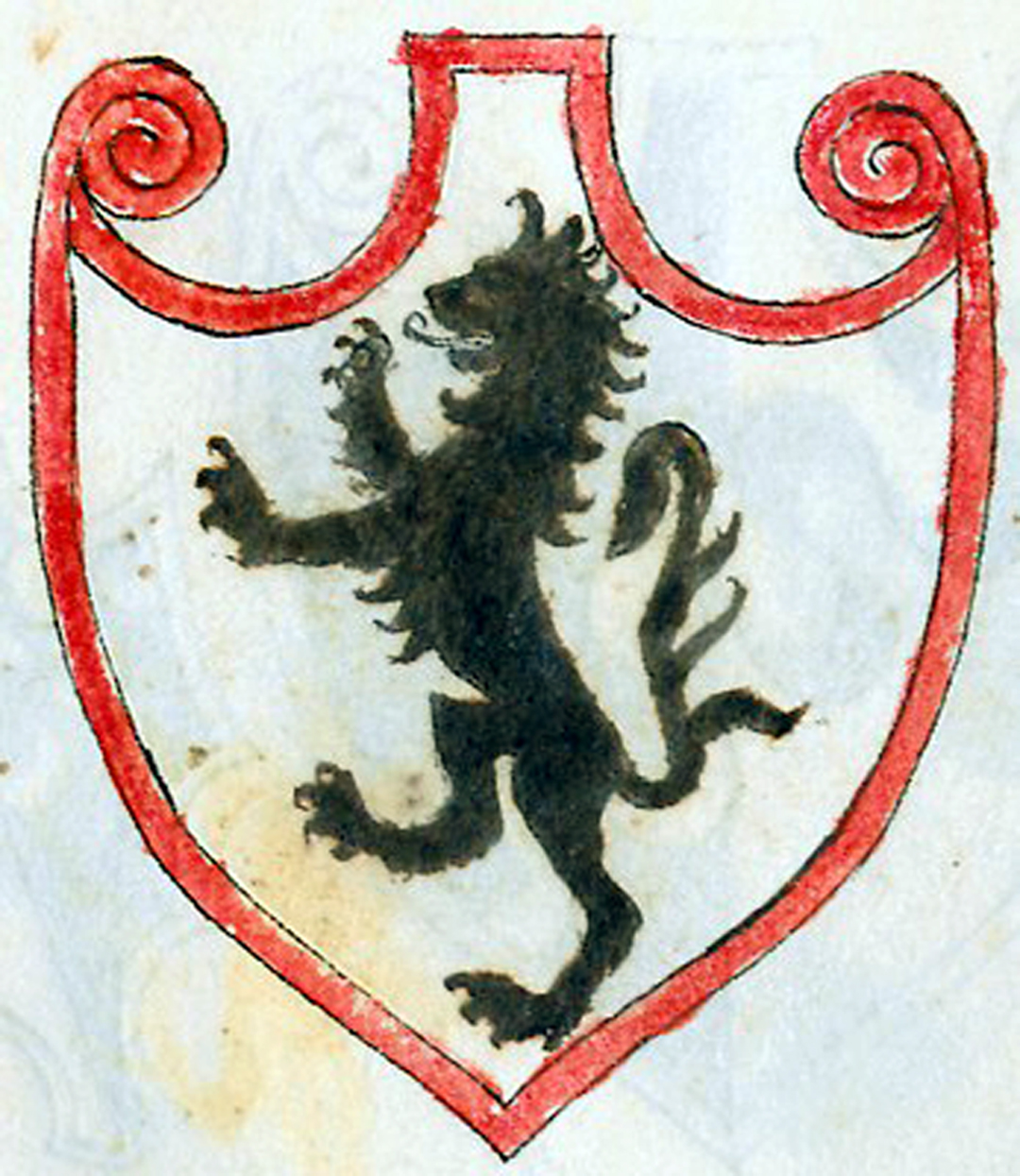 Brasão Longo (Longhi).